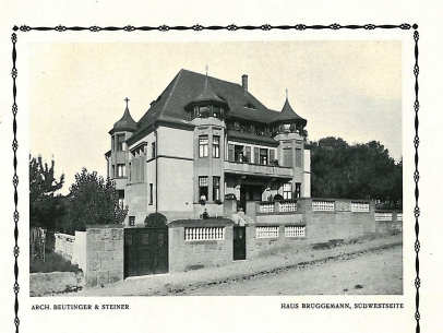 Villa des Fabrikanten Brüggemann, später Villa Pfleiderer genannt, in Heilbronn, Lerchenstraße 79, nicht erhalten